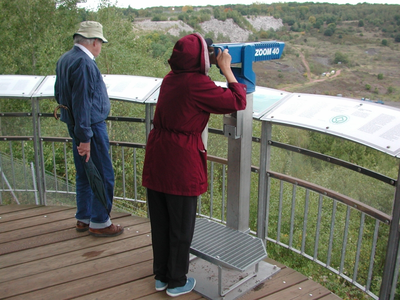 Grube Messel, Germany